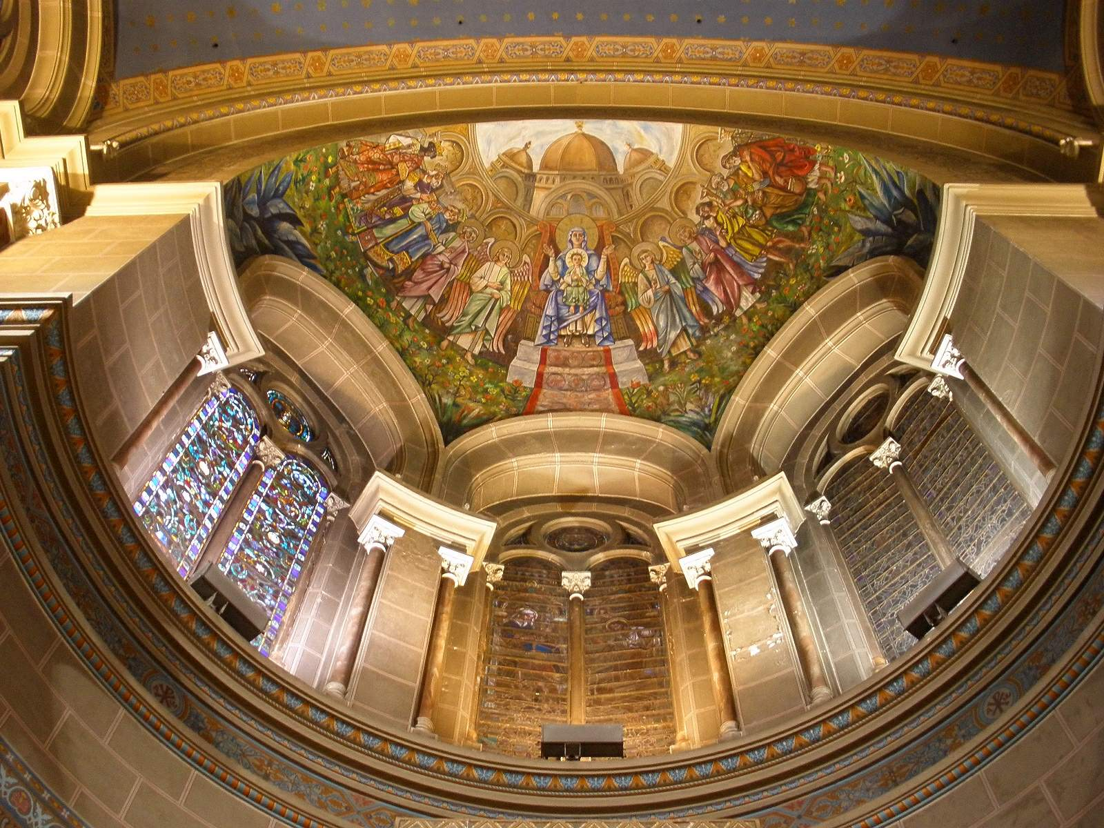 Oviedo - Iglesia de San Juan el Real